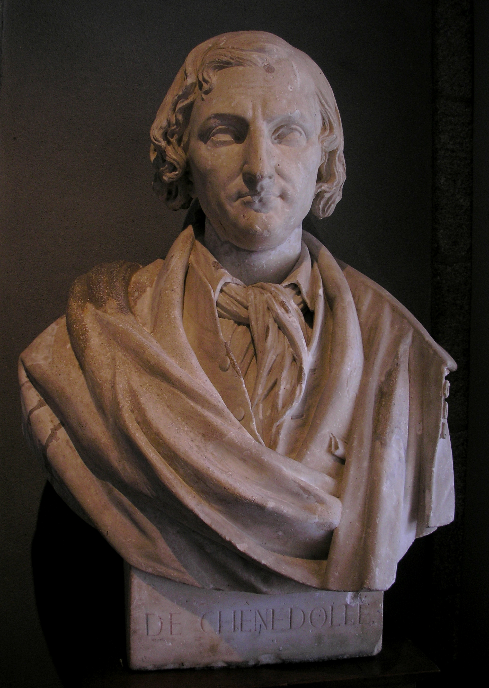 Buste de Charles-Julien Lioult de Chênedollé par Victor Le Harivel-Durocher (1816-1878), au musée de Vire (Normandie, France).